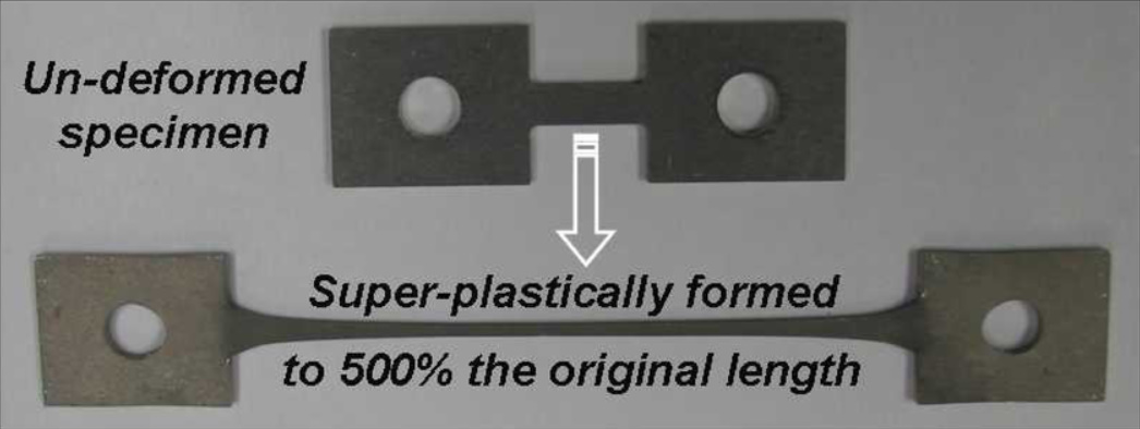 تغییر شکل سوپرپلاستیک